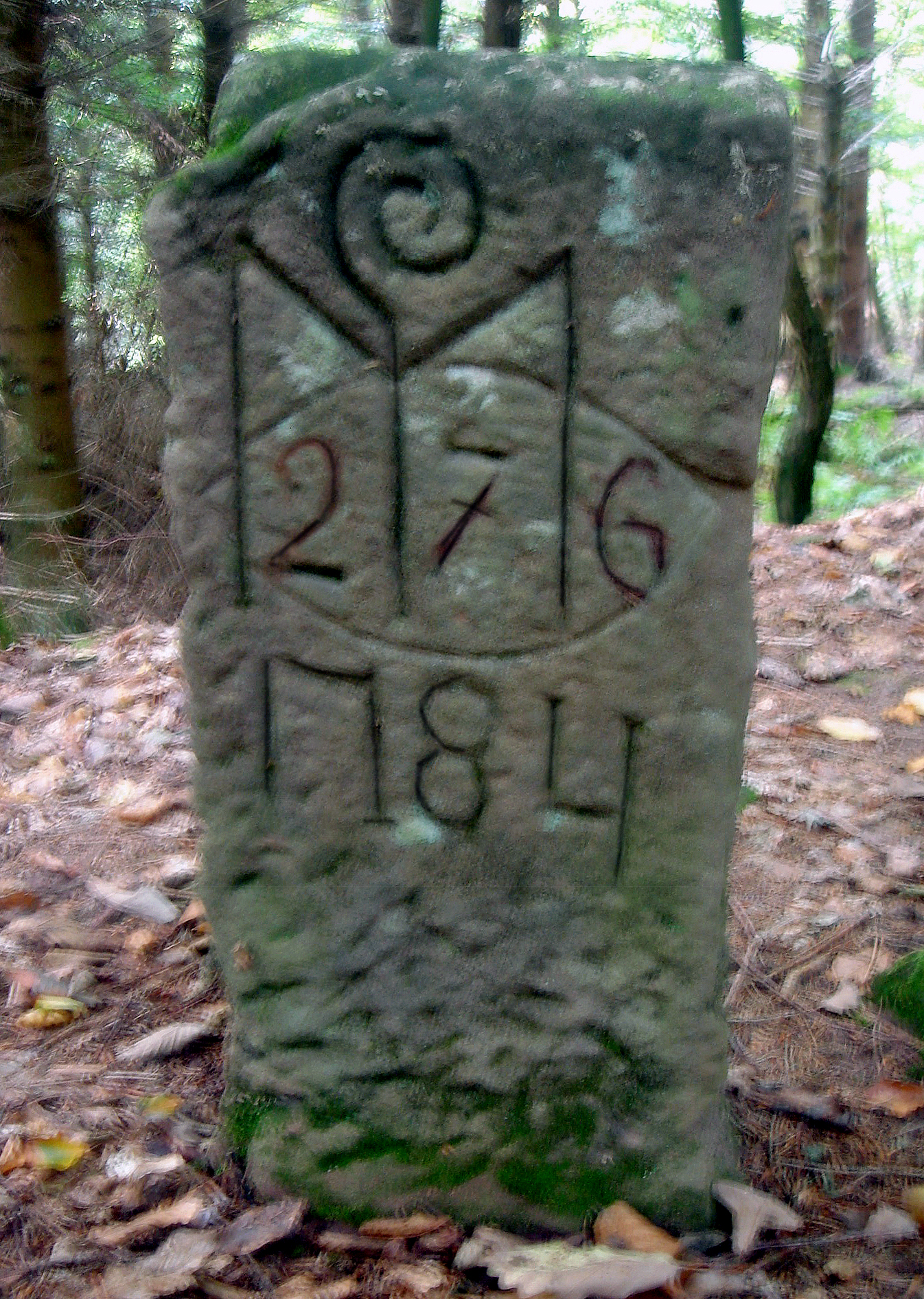 Borne indiquant la partie de la forêt de Garrebourg appartenant à l'abbaye de Marmoutier